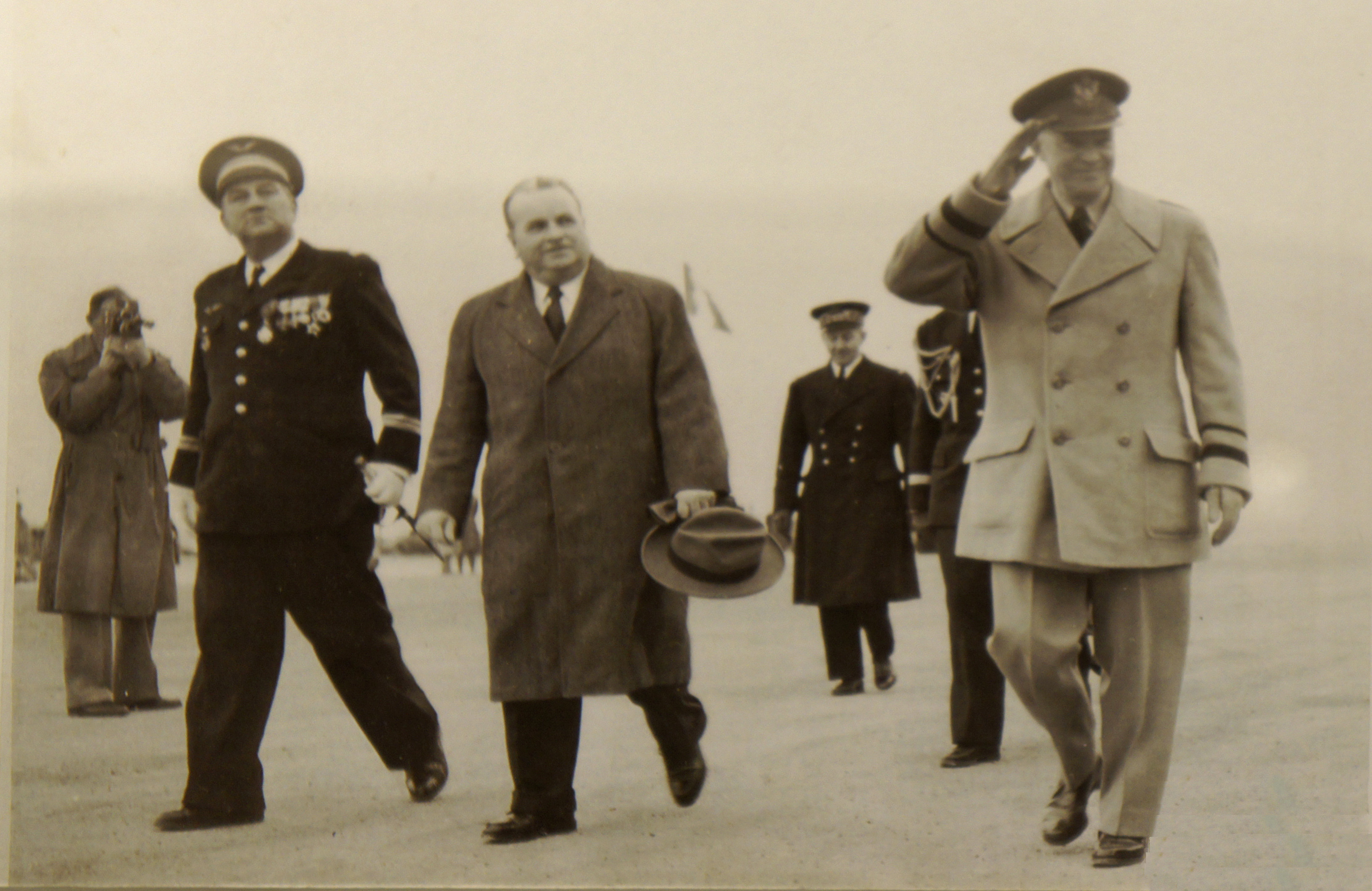 Musée de l'aéronautique de Bétheny, Eisenhower vient célébrer l'arrivée des Thunderjet en France dans le cadre du Military assistance program et a été accueilli par Bidault et Housset.